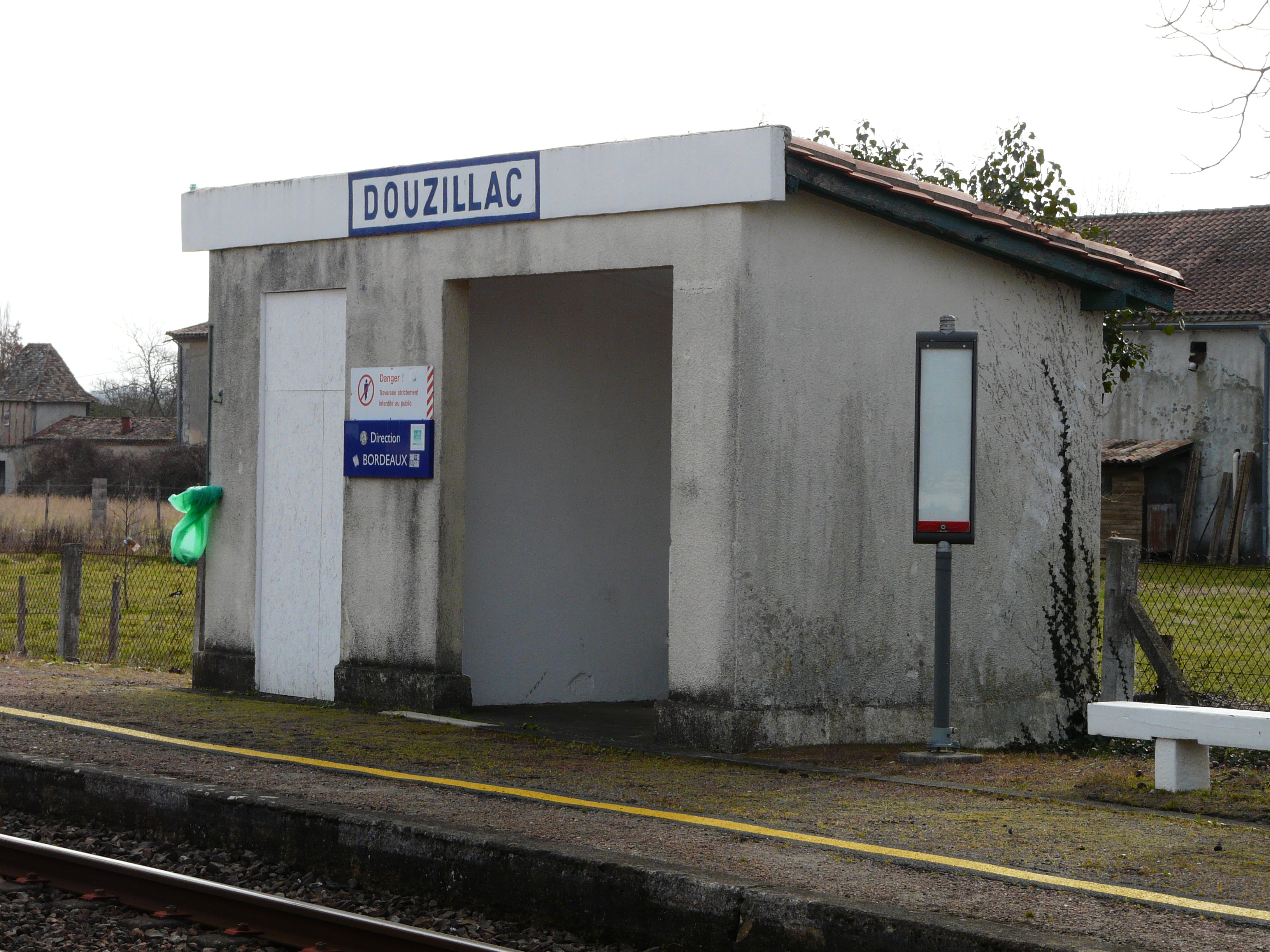 Abri voyageurs de la halte ferroviaire de Douzillac, Dordogne, France.